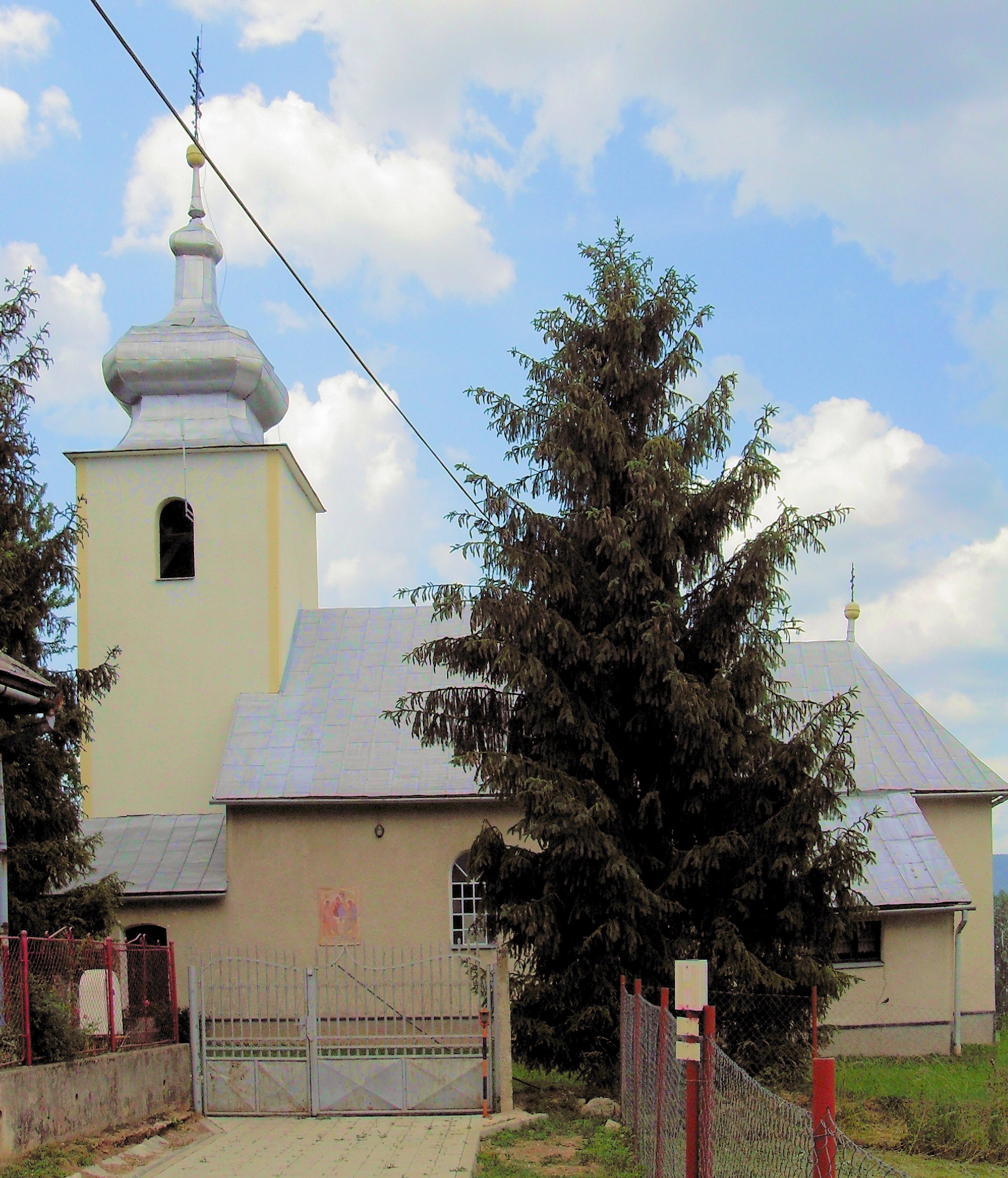 Chorváty, kostol Nanebovzatia